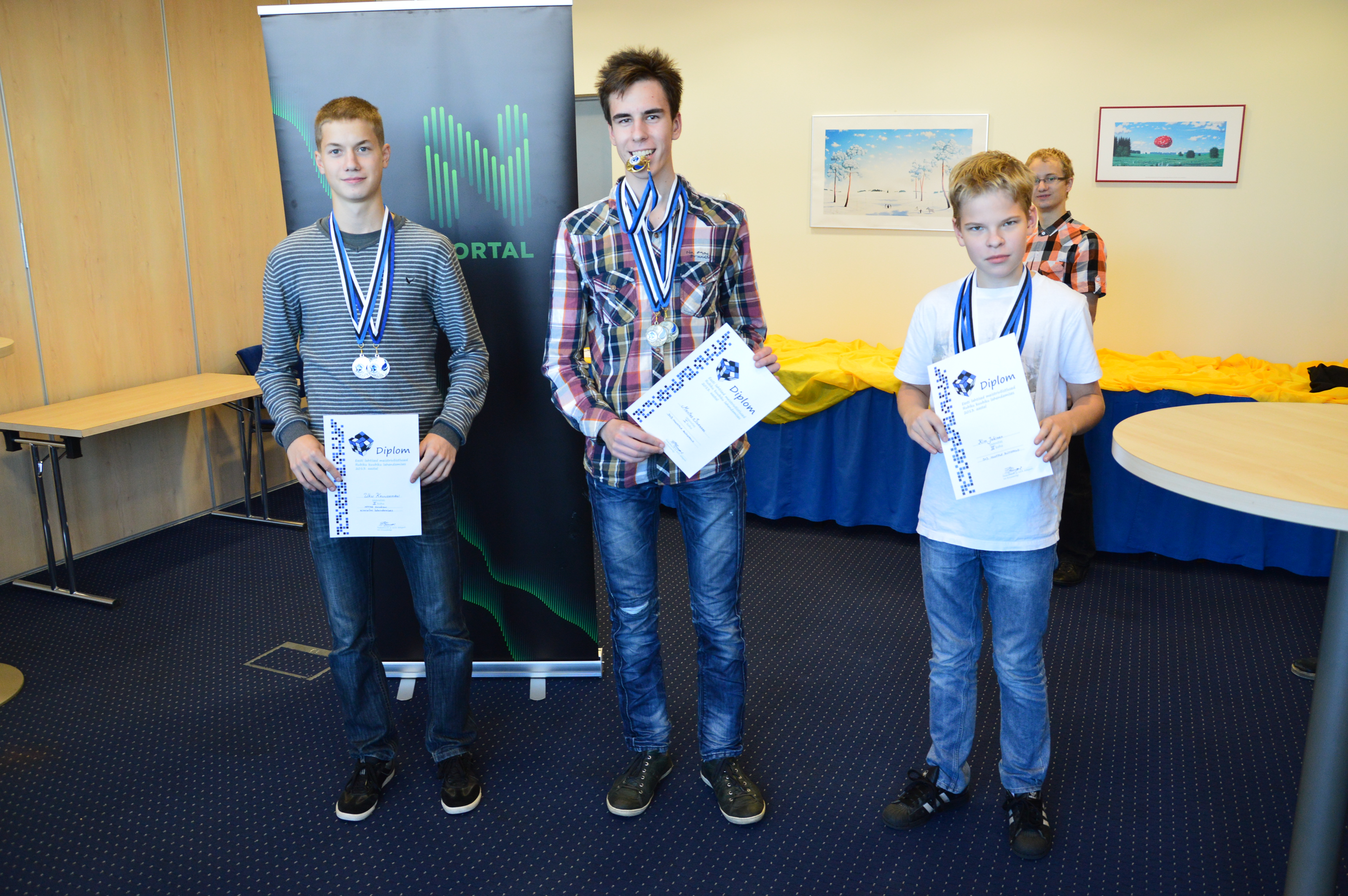 Estonian Open 2013: mitme kuubiku kinnisilmi lahendamise võitjad. Alates vasakult: Uku Kruusamägi (Eesti), Mantas Sidabras (Leedu) ja Kim Jokinen (Soome).